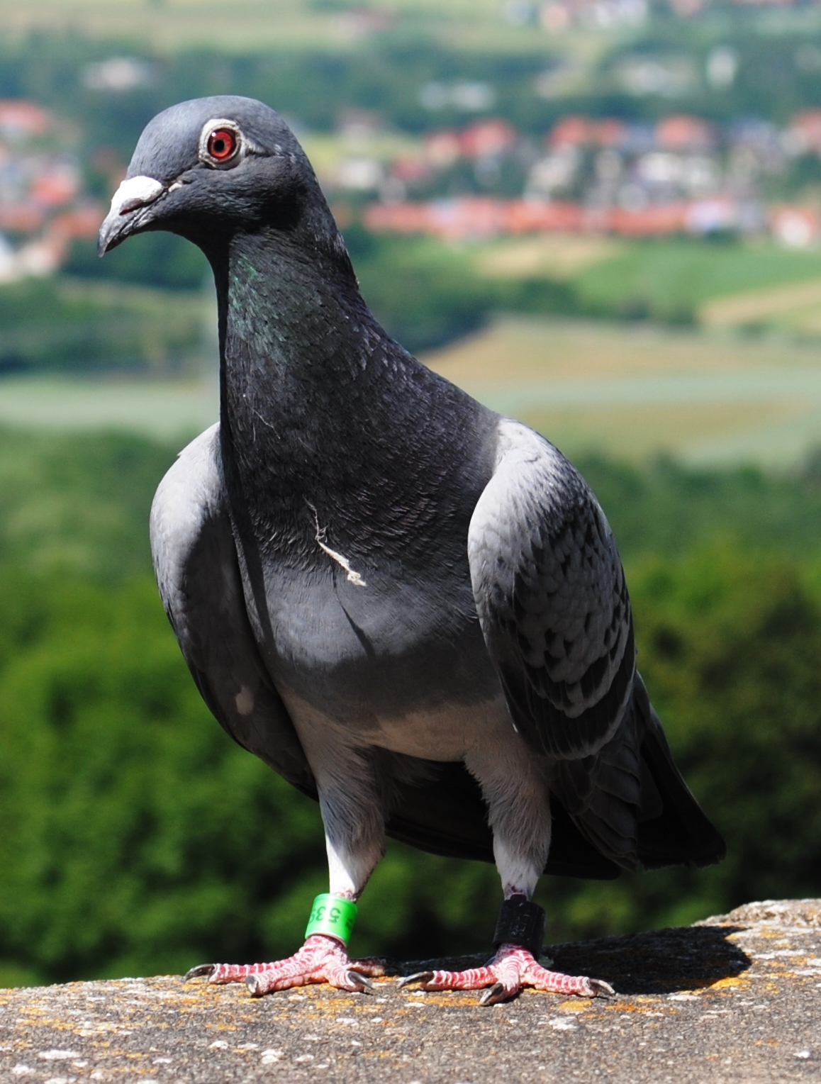 Brieftaube auf der Giechburg, Scheßlitz